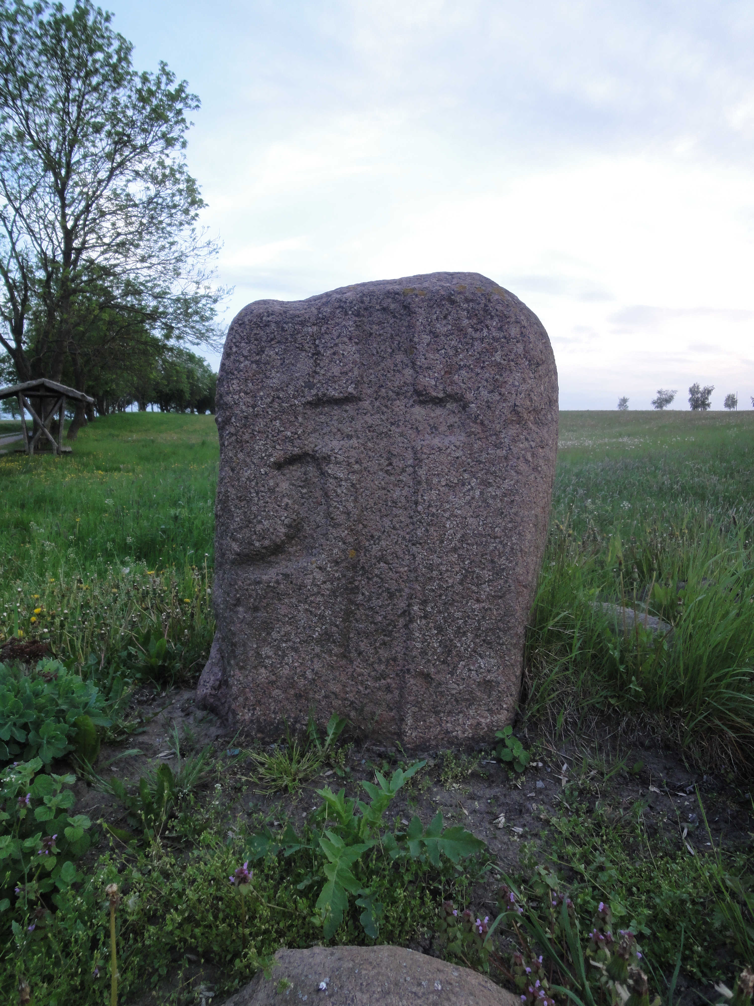 Wartislawstein bei Güttrow